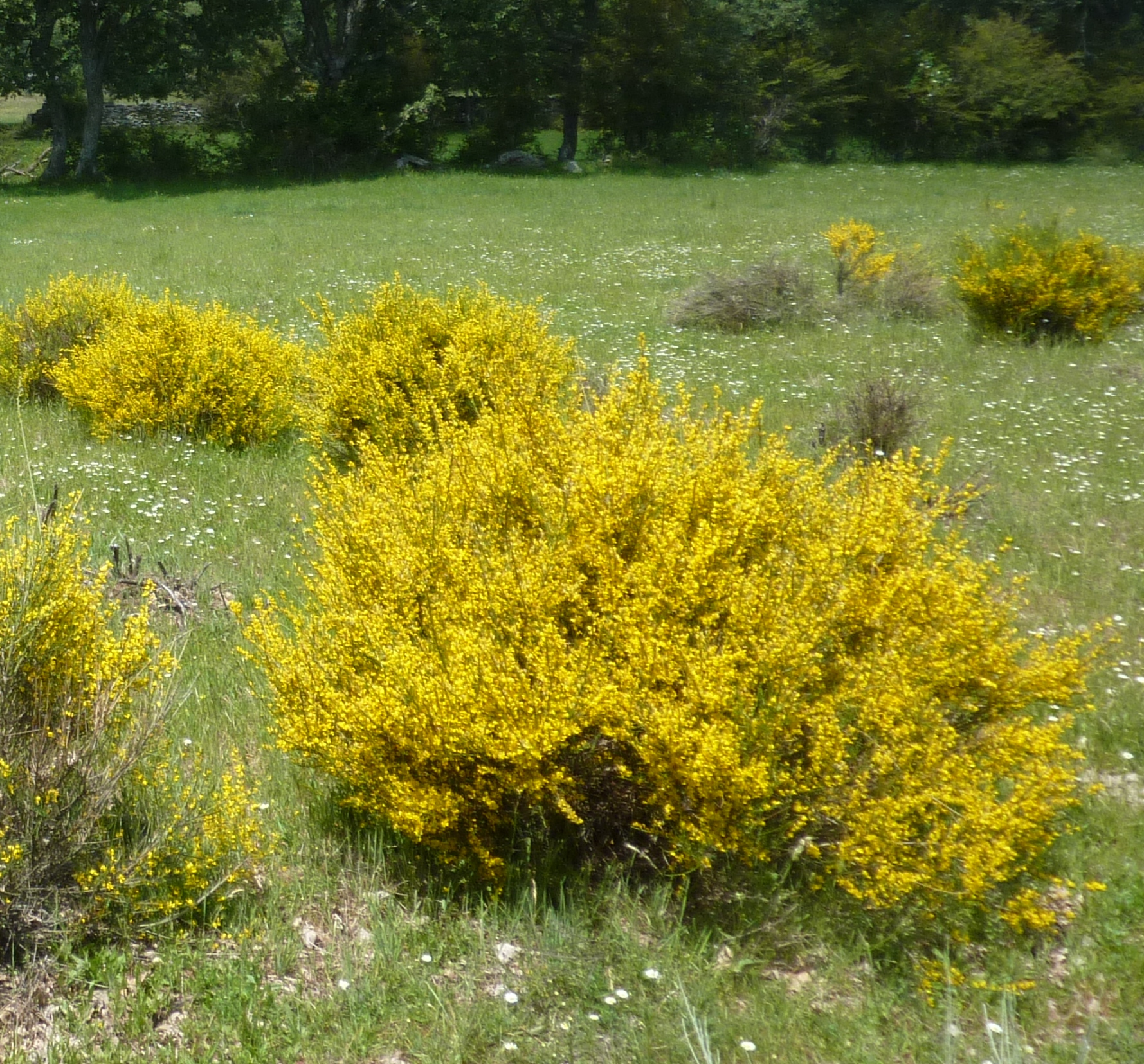 Genista hystrix en floración